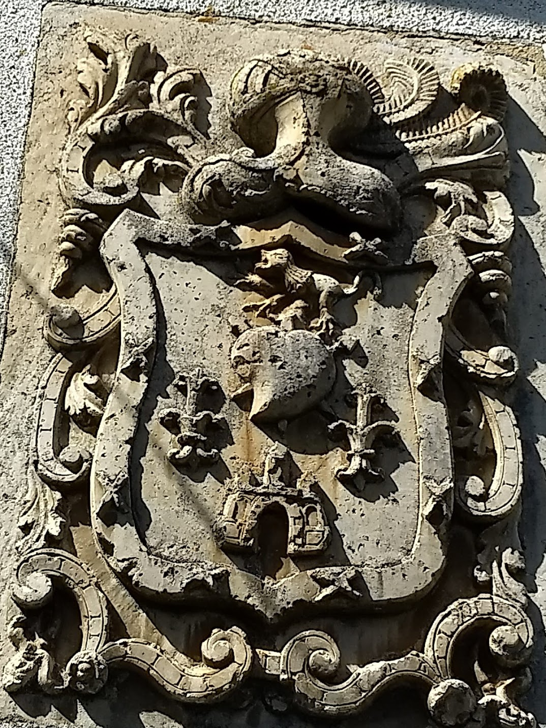 Escudo en vivienda de Cofiñal